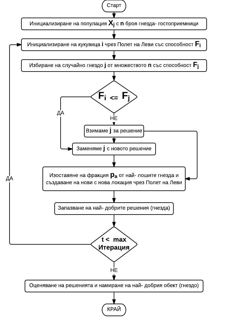 Cuckoo search flowchart